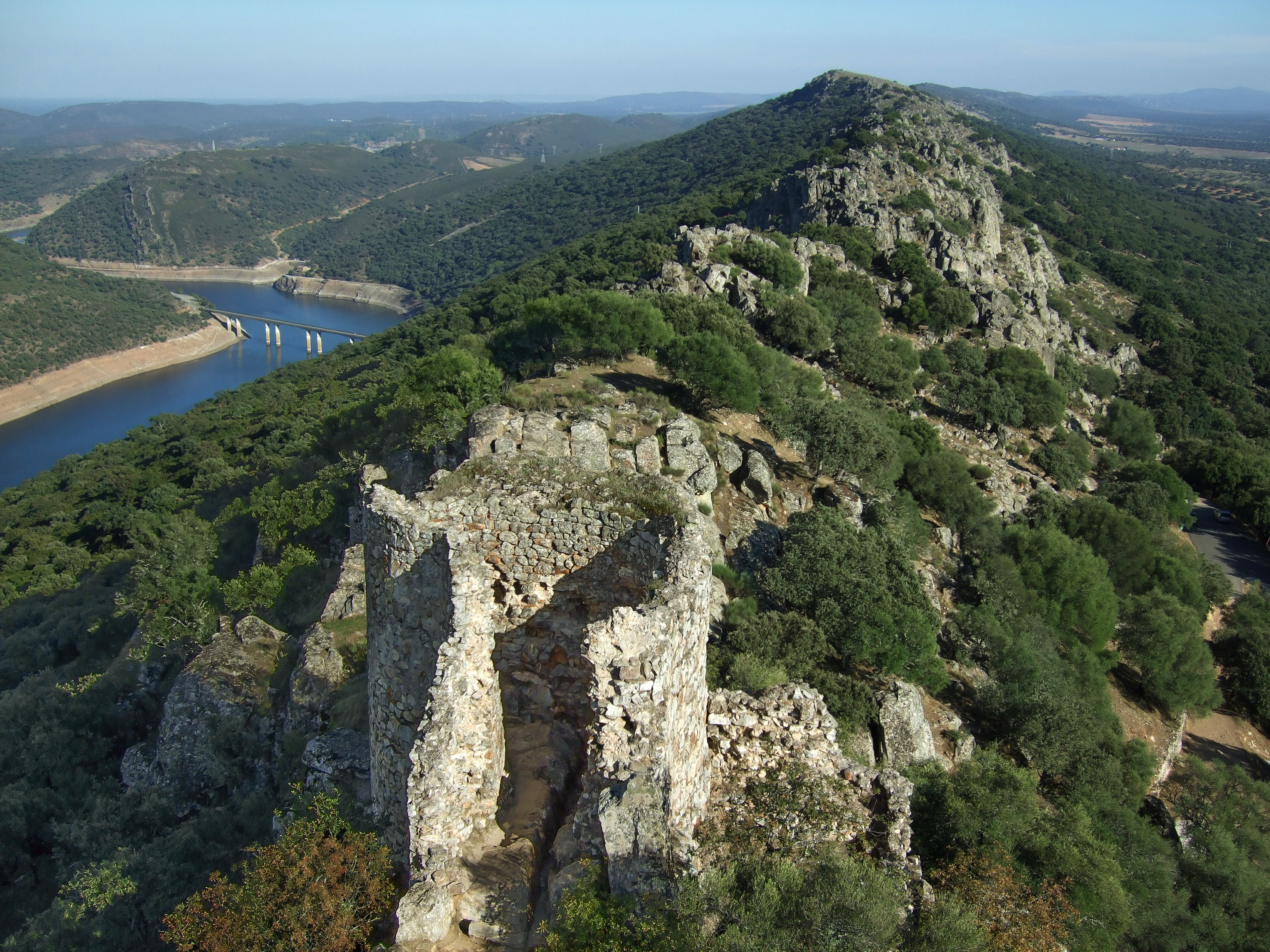 Vista del rio Tajo y parte del castillo de Monfragüe